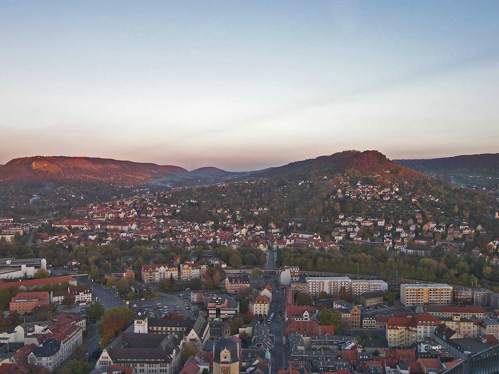 Jena, Blick vom JenTower auf einen Teil der Stadt